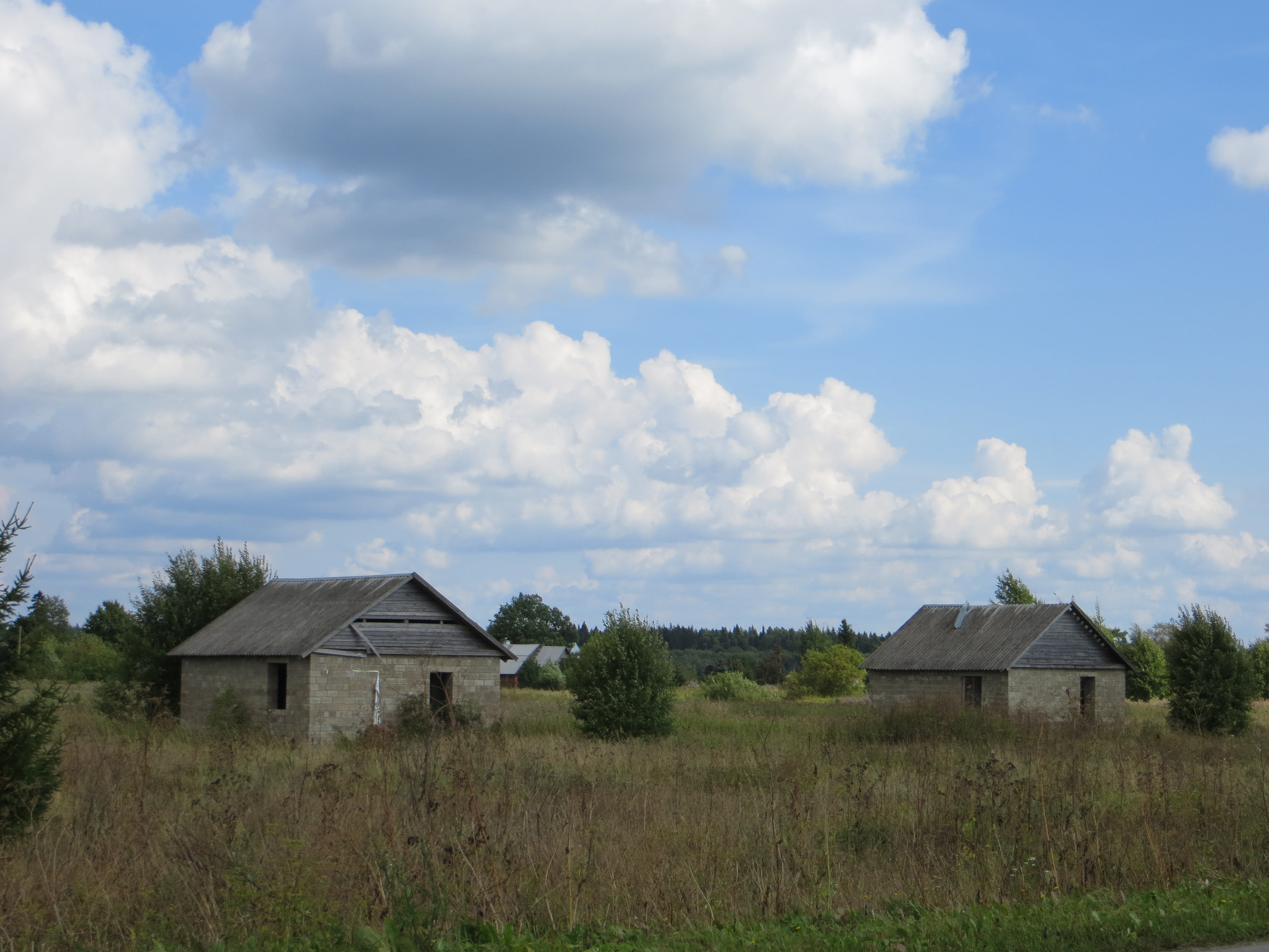 Деревня Большое Кикерино.